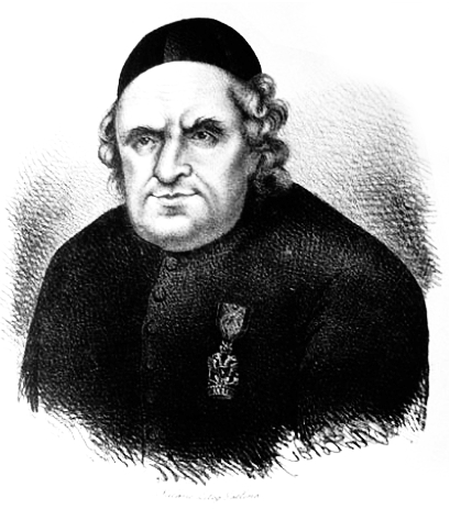 Ermenegildo Pini (1739–1825)